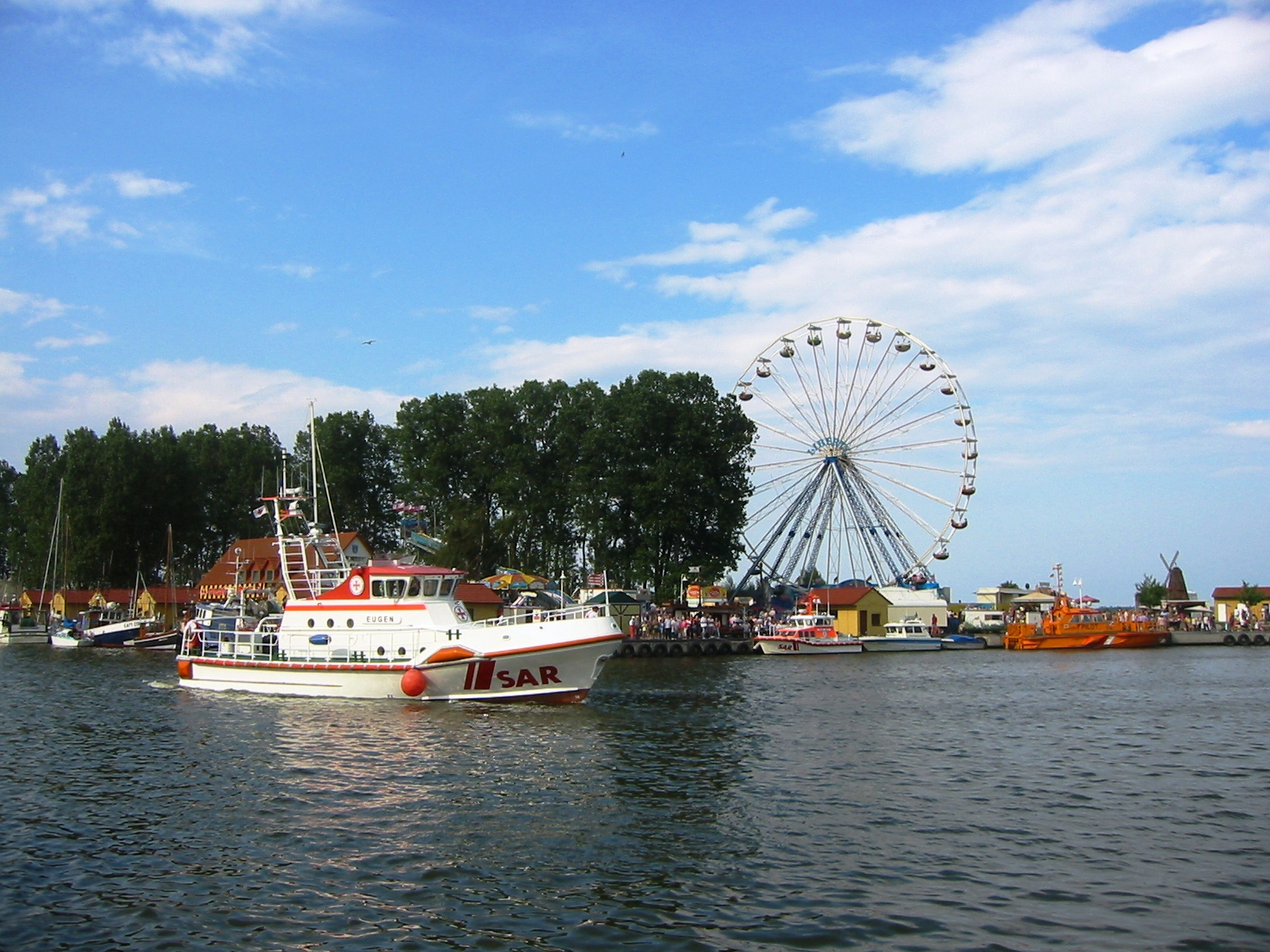 Blick in den Hafen von Freest (Gemeinde Kröslin) in Ostvorpommern anlässlich des Fischerfestes. Das Fest findet jährlich am ersten Augustwochenende statt.